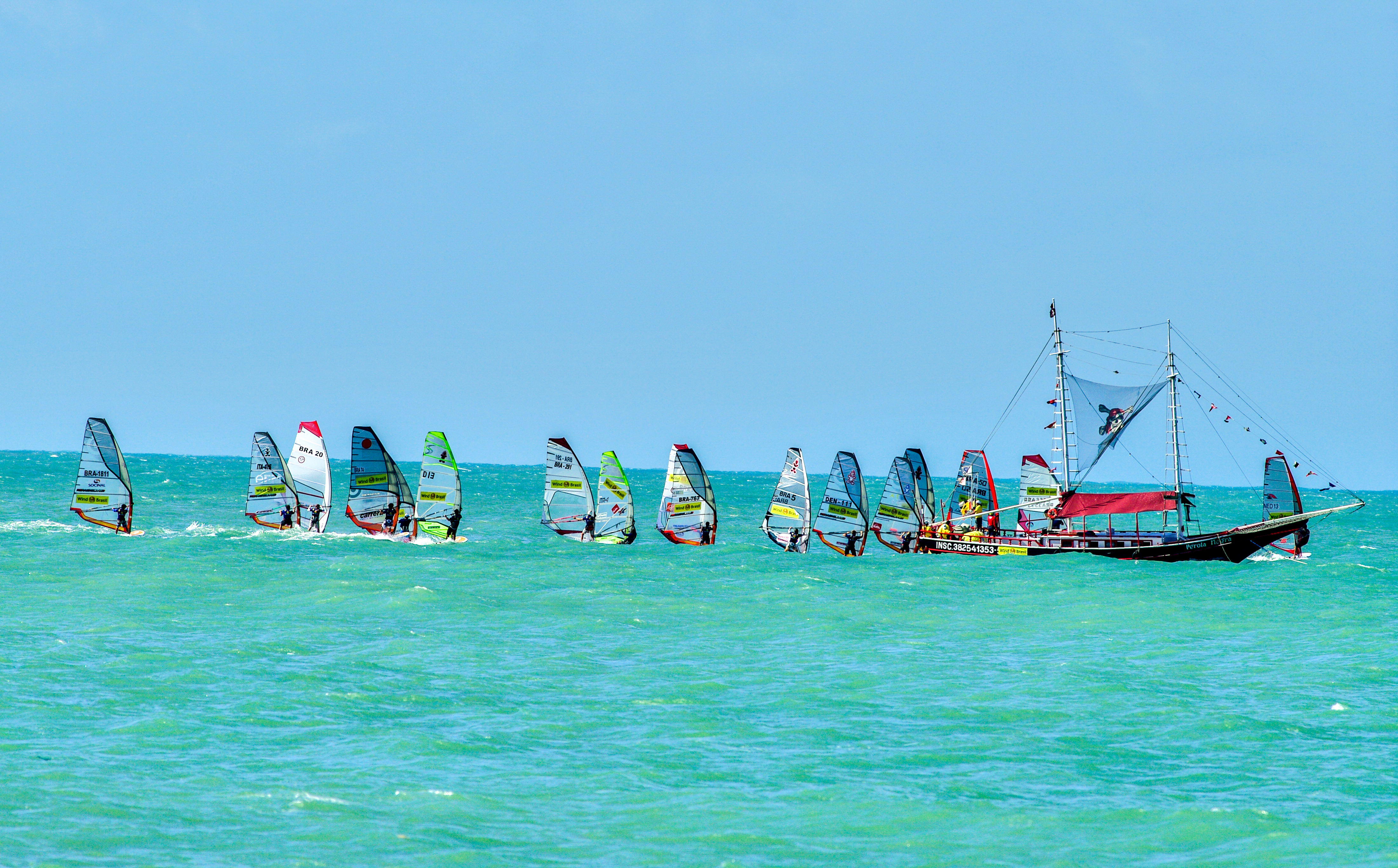 Competição Wind Brasil 2009, em Fortaleza, Brasil.